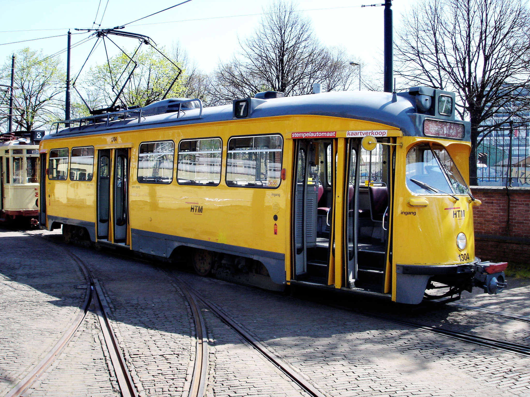 HTM museumtram/museum streetcar